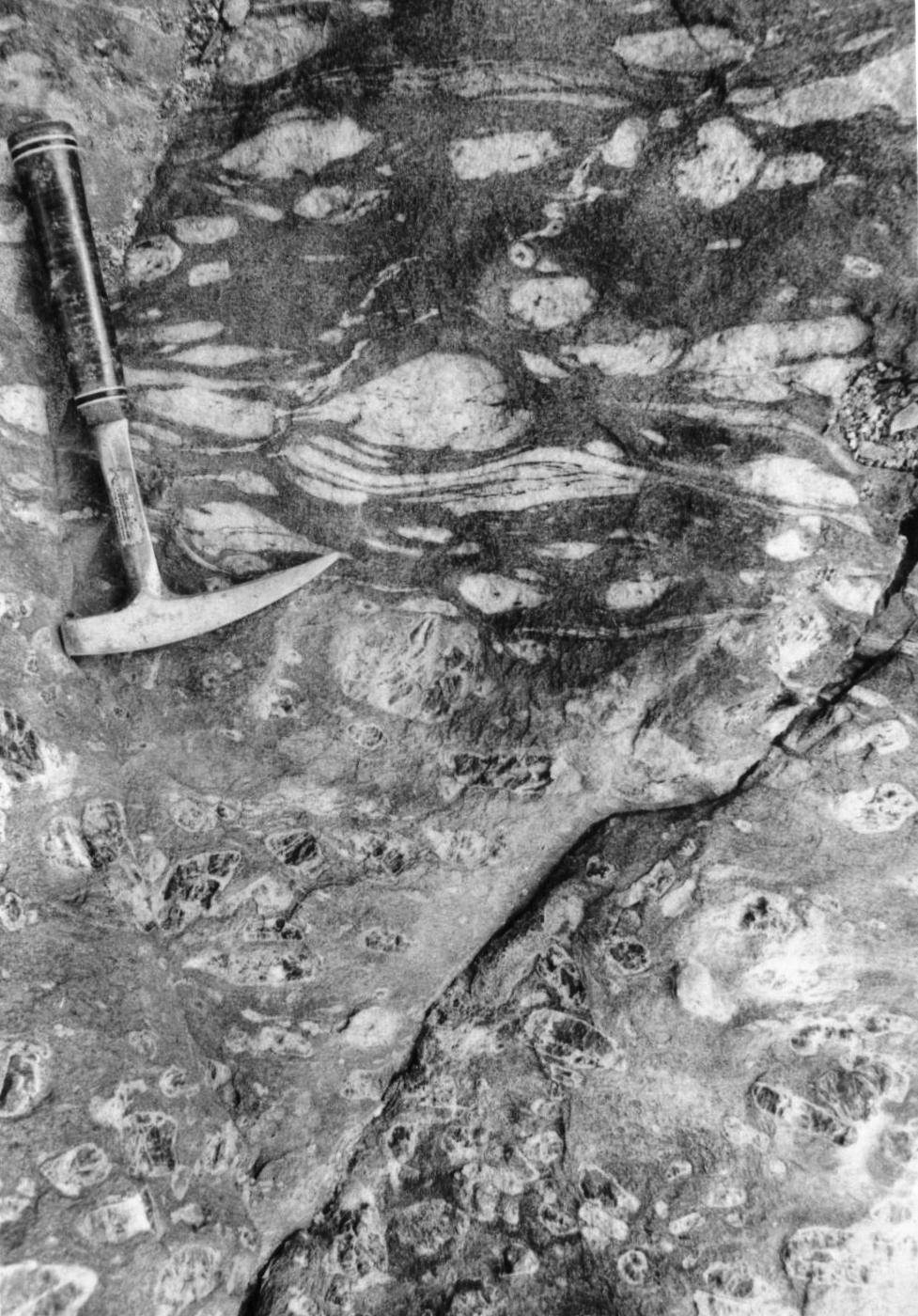 Übergang von einem undeformierten Granodiorit (unten) in einen Protomylonit. Der Granodiorit enthält klaren, dunklen Andesin, im Protomylonit bestehen die Porphyroklasten aus rekristallisiertem Oligoklas(Orvinfjella, Dronning Maud Land, Antarktika)